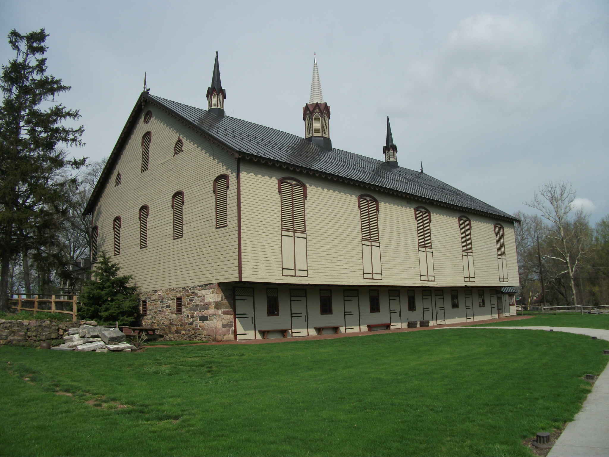 Fort Hunter, Pennsylvania